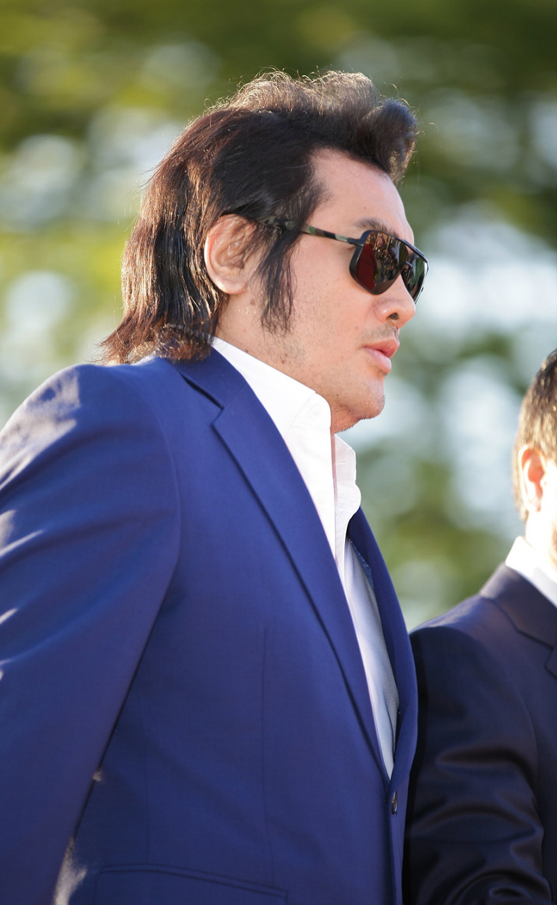 제19회 부천국제판타스틱영화제 레드카펫 part.3